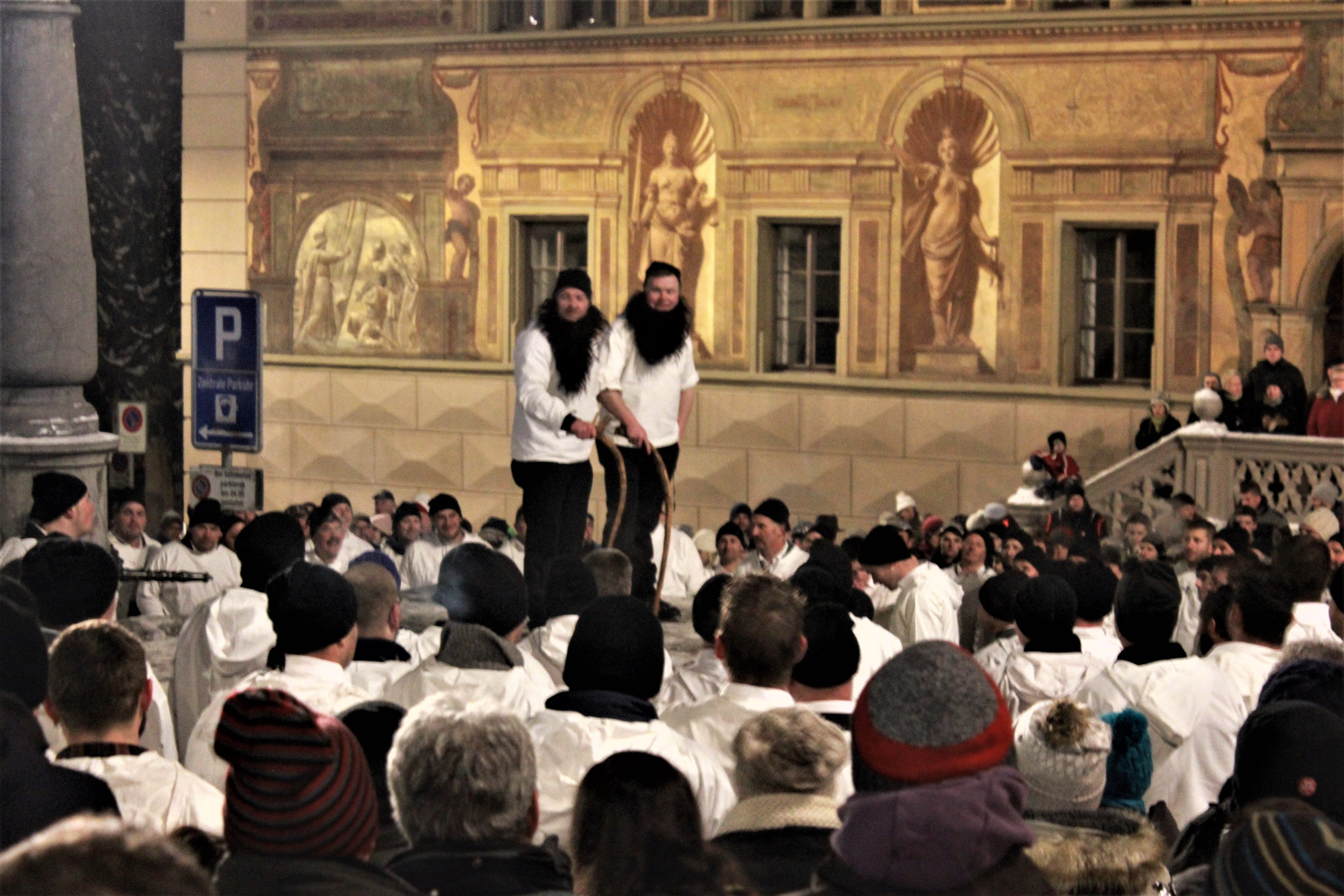 Plöder (spöttisches Bühnengespräch) der Schwyzer Greifler auf den Hauptplatz in Schwyz am Dreikönigsabend 2017